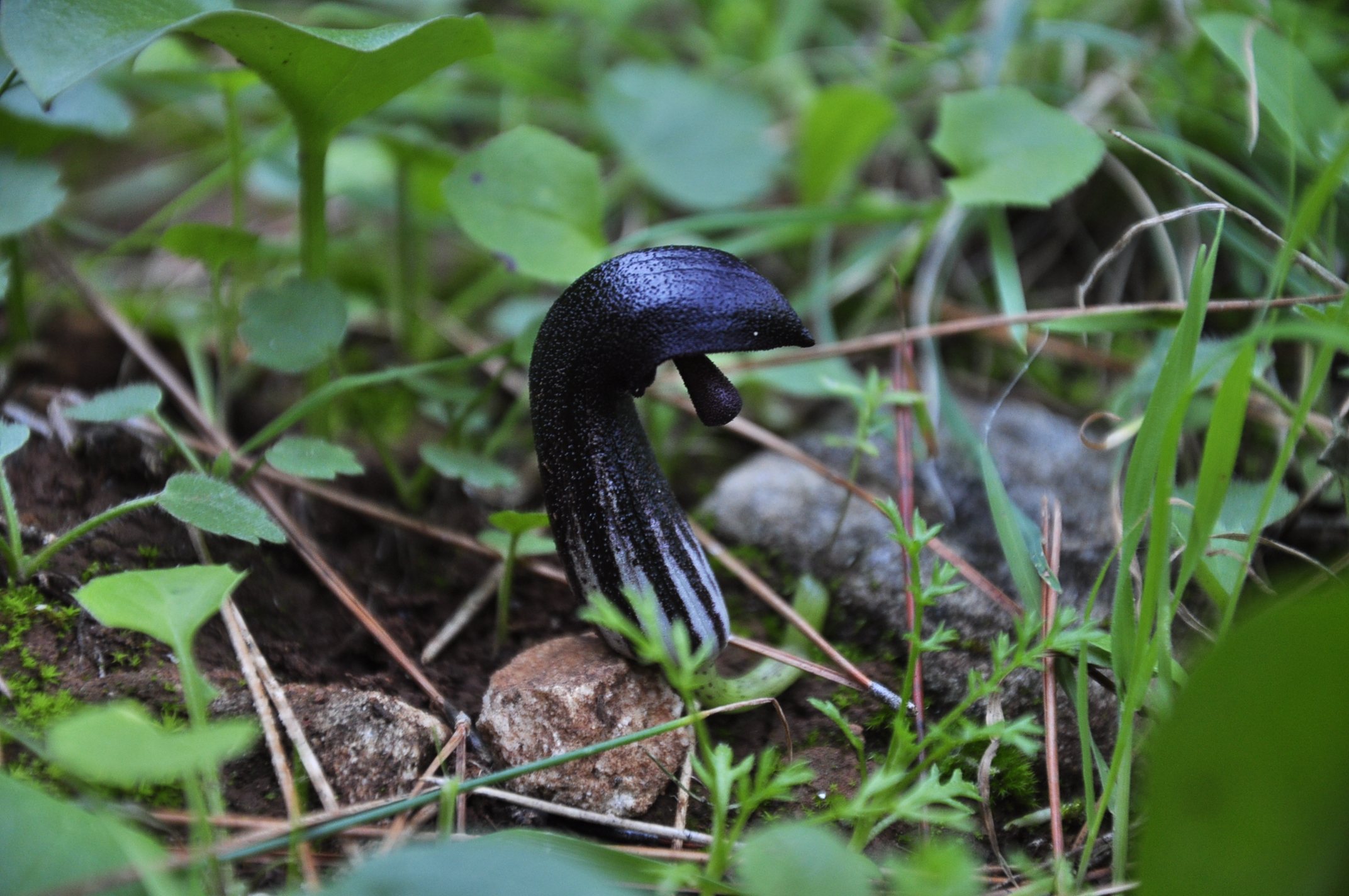 Foto hecha en Alhaurín el Grande (sierra de Mijas, cara norte)